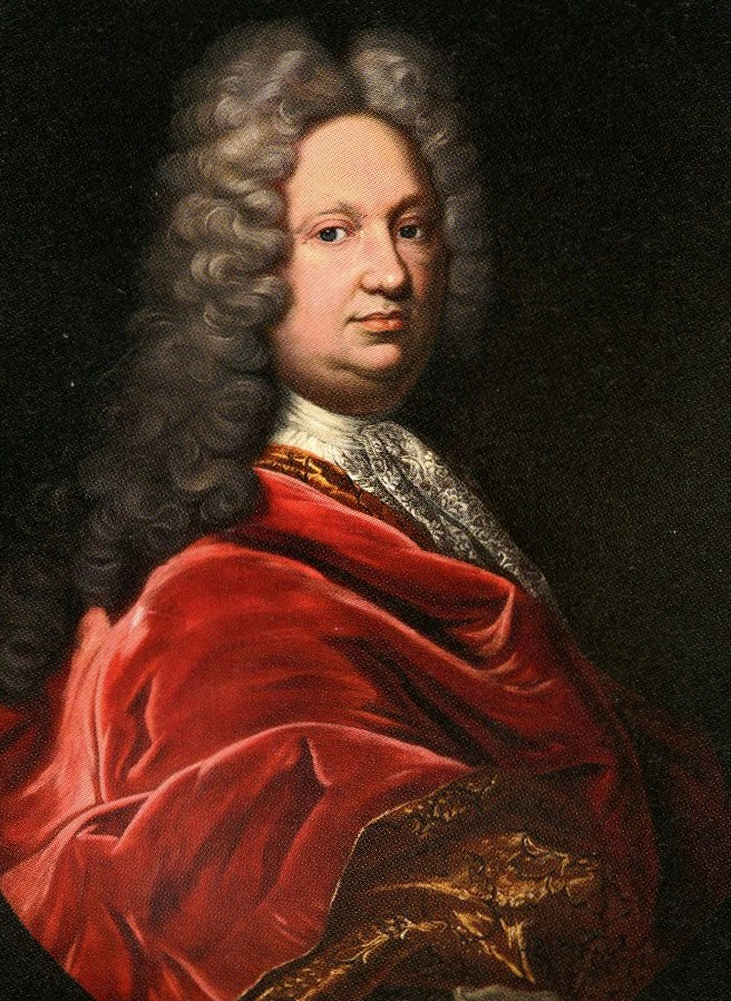 portrét_ Filip Nerius (Neri) hrabě Krakowský z Kolowrat